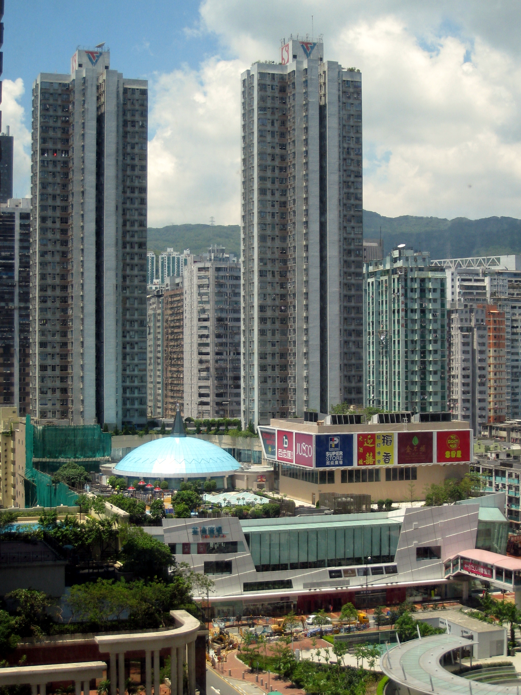 Tsuen Wan Plaza 荃灣廣場